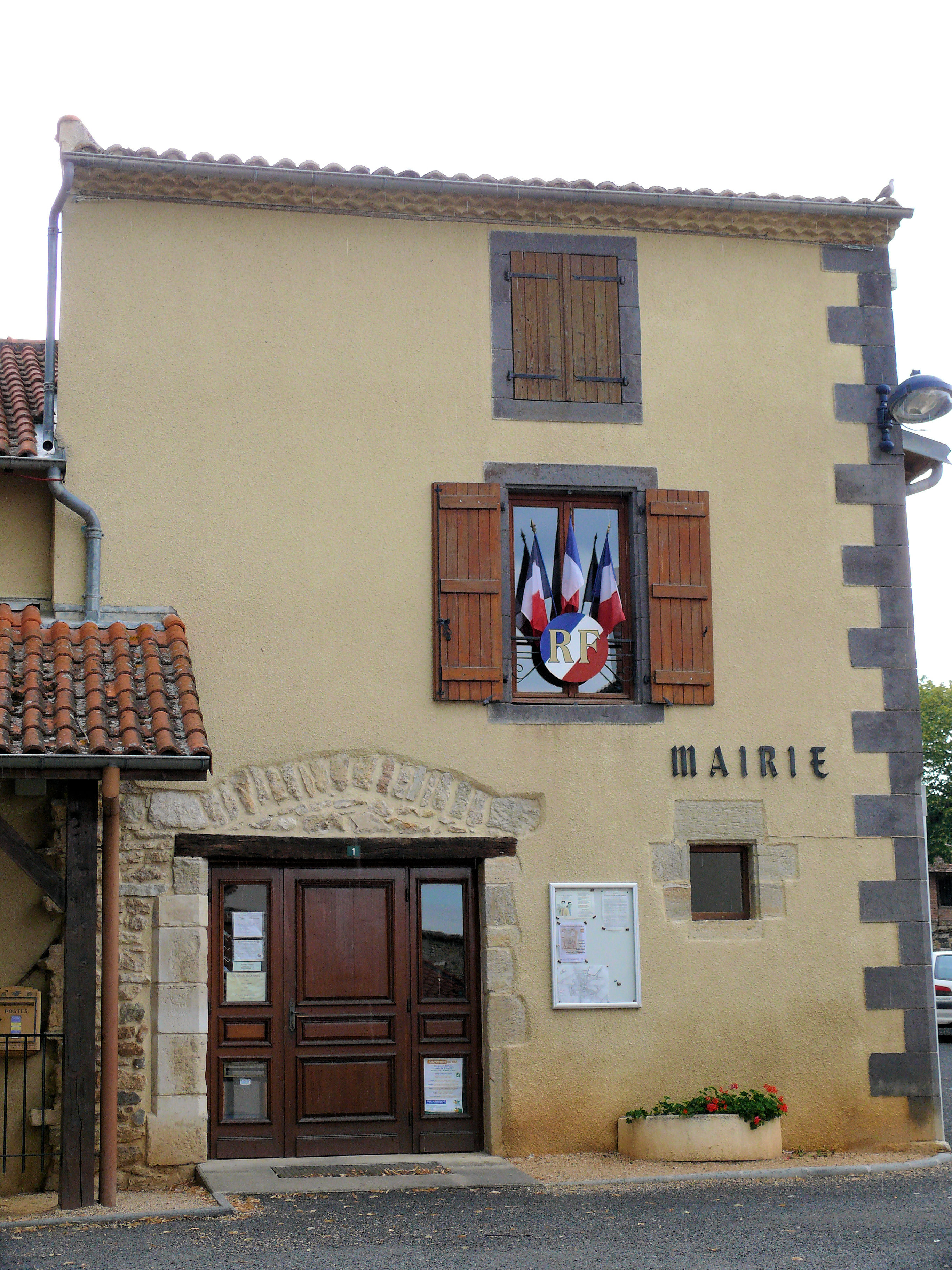 Chas (Puy-de-Dôme) - Mairie